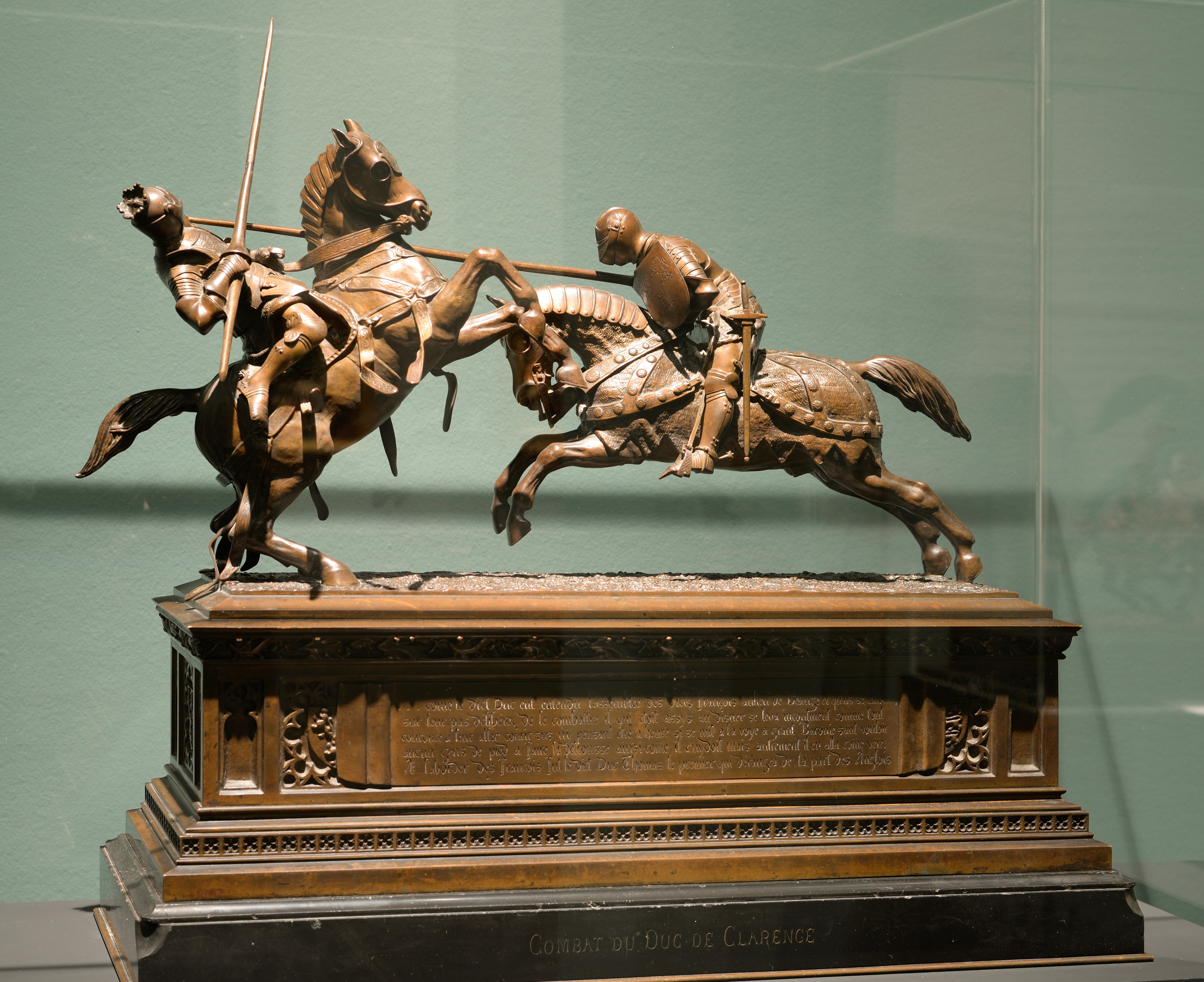 Le Combat du duc de Clarence, sculpture d'Émilien de Nieuwerkerke en 1839, exposé au Musée des beaux-arts de Lyon en 2014.